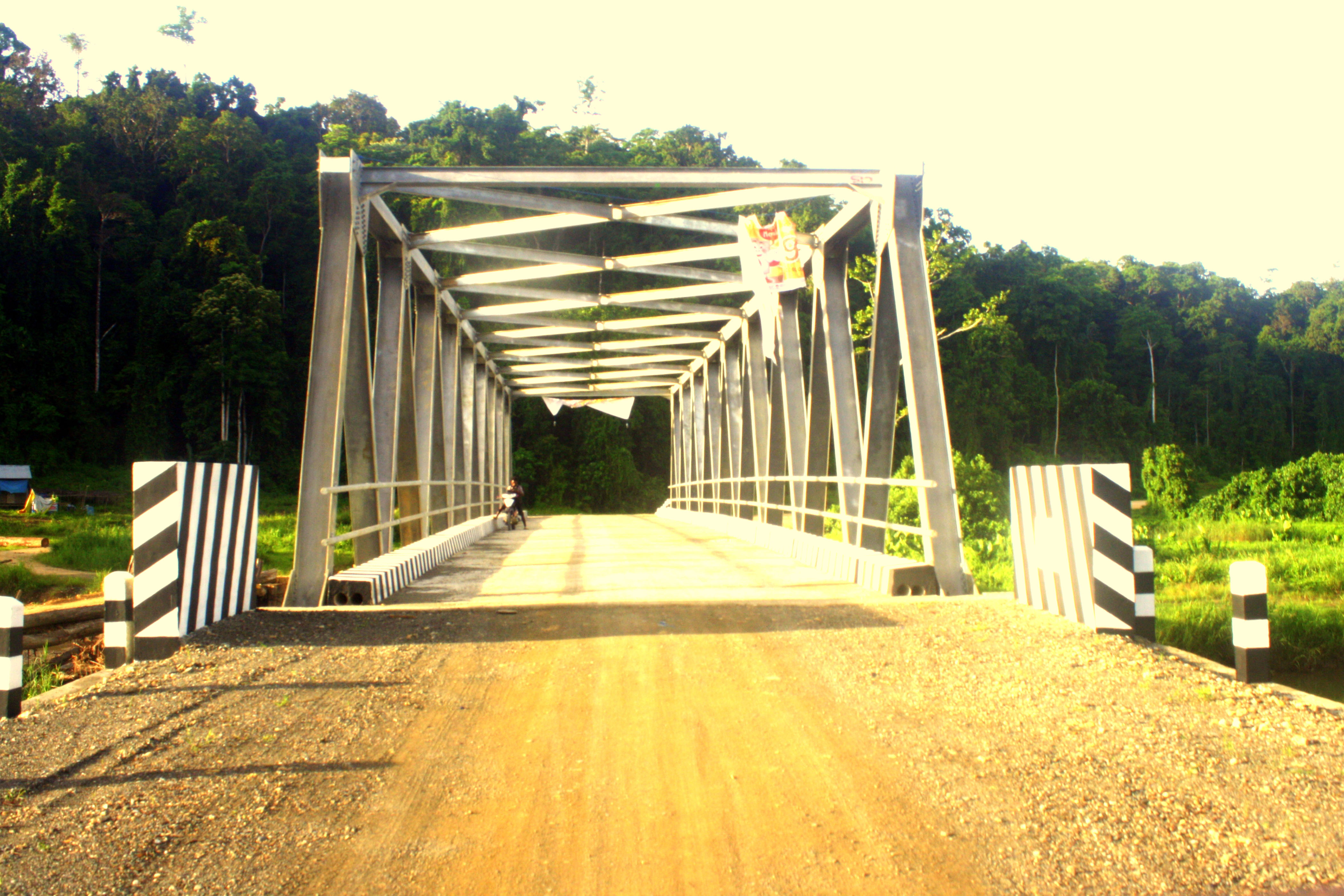 Jembatan Sungai Warswai, Tambrauw Papua Barat Indonesia